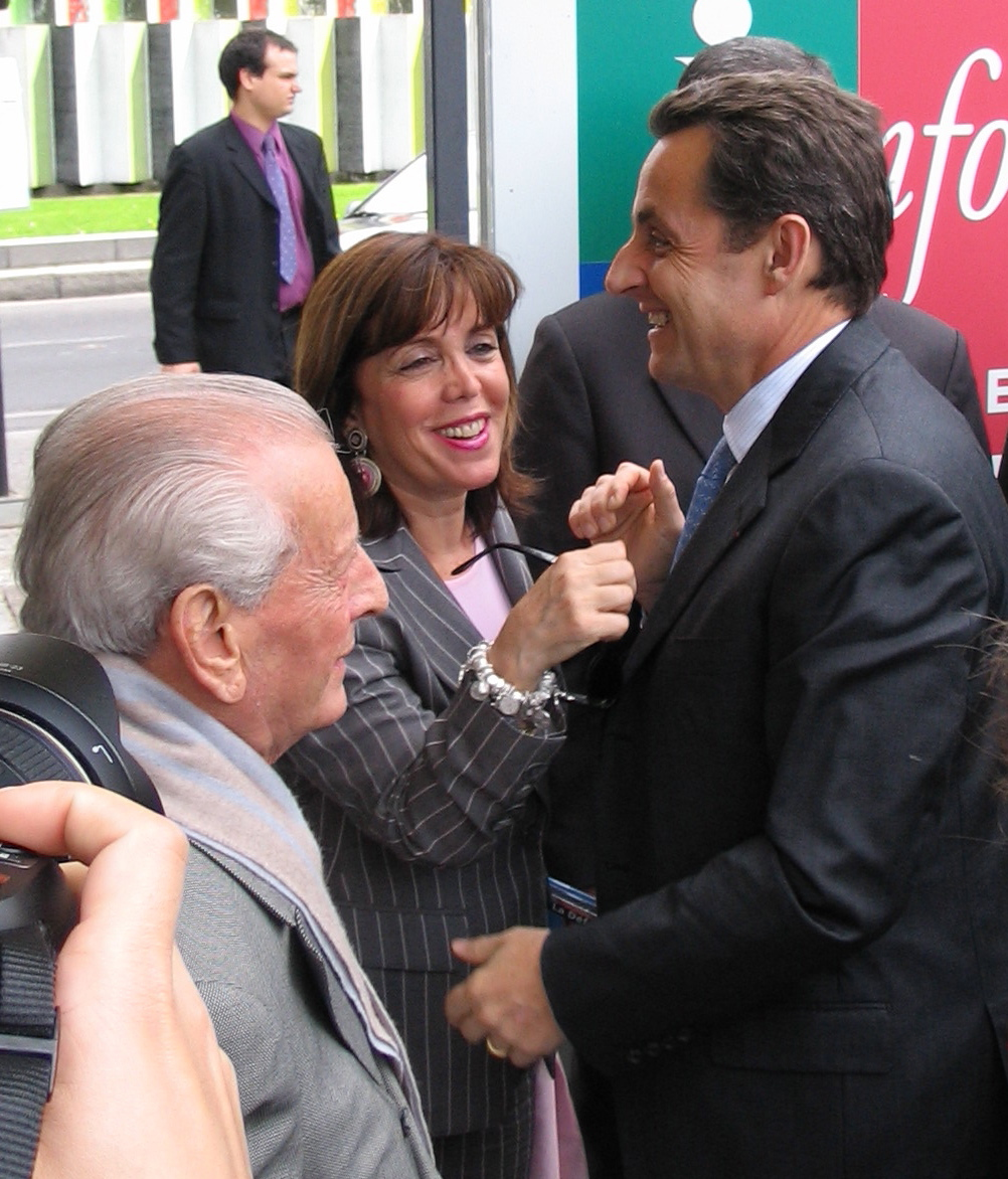 Nicolas Sarkozy, Joelle et Charles Ceccaldi Raynaud en 2005.